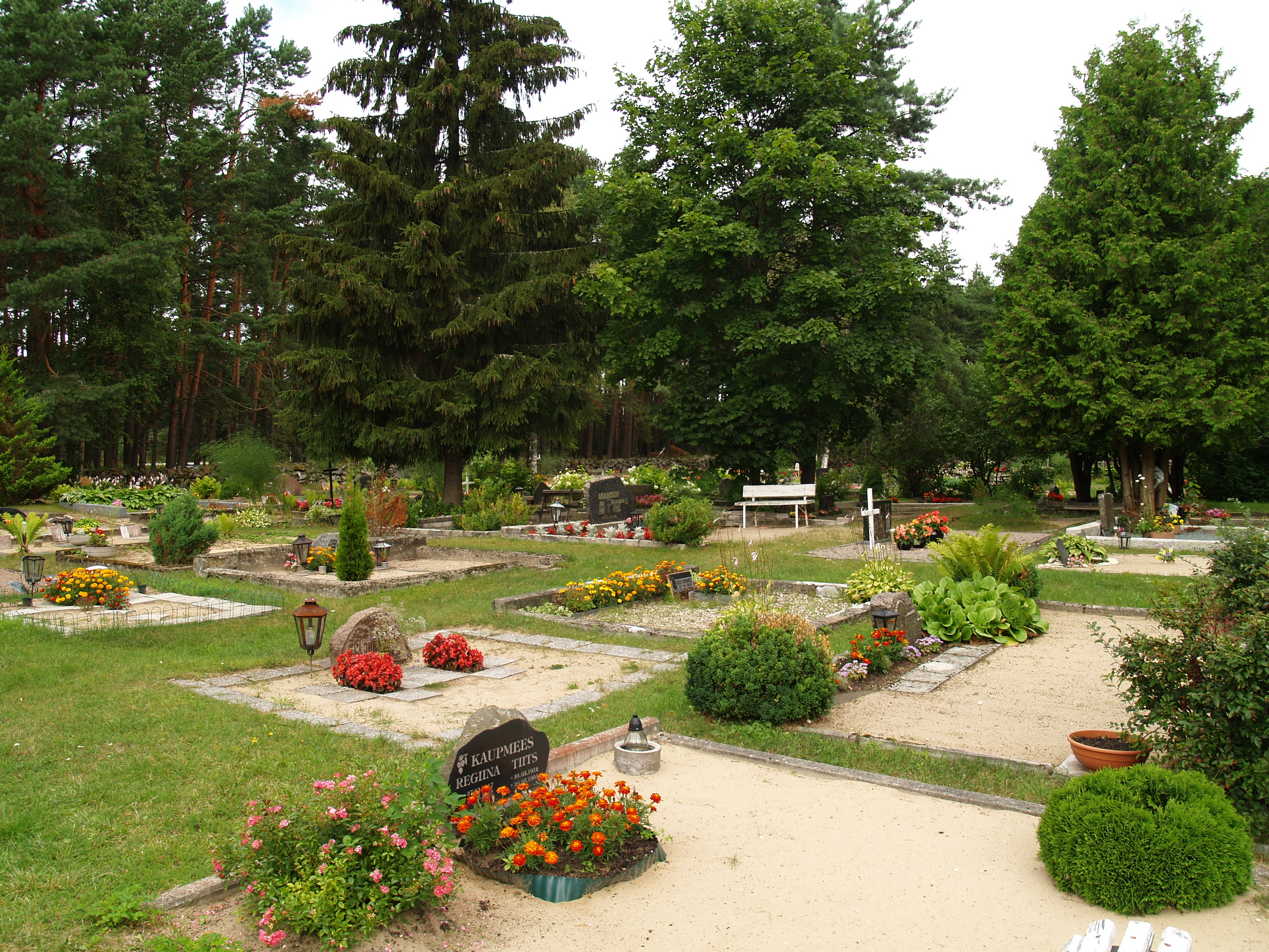 Võiste kalmistu